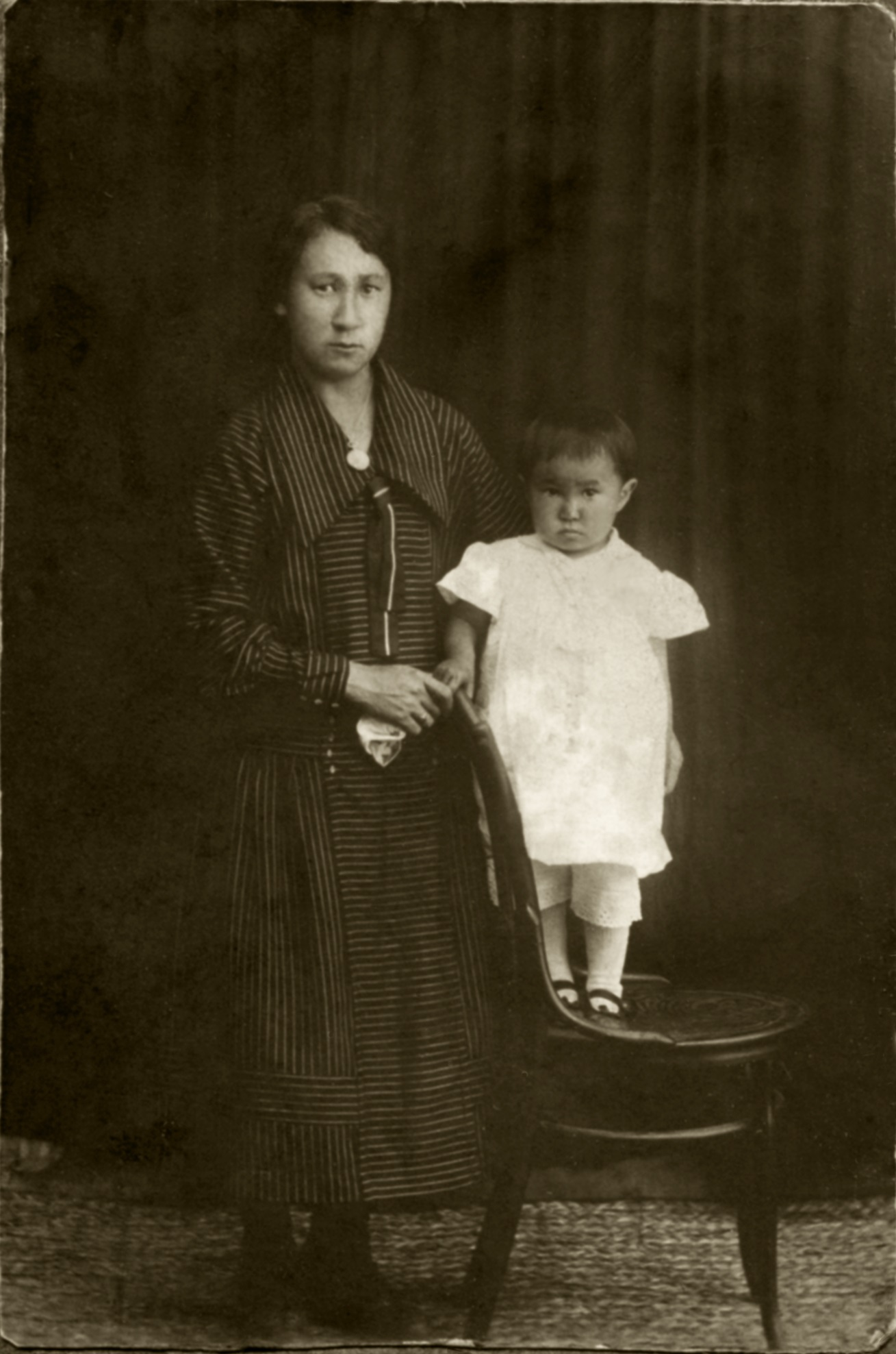 Поротова А.П. с дочкой Наташей